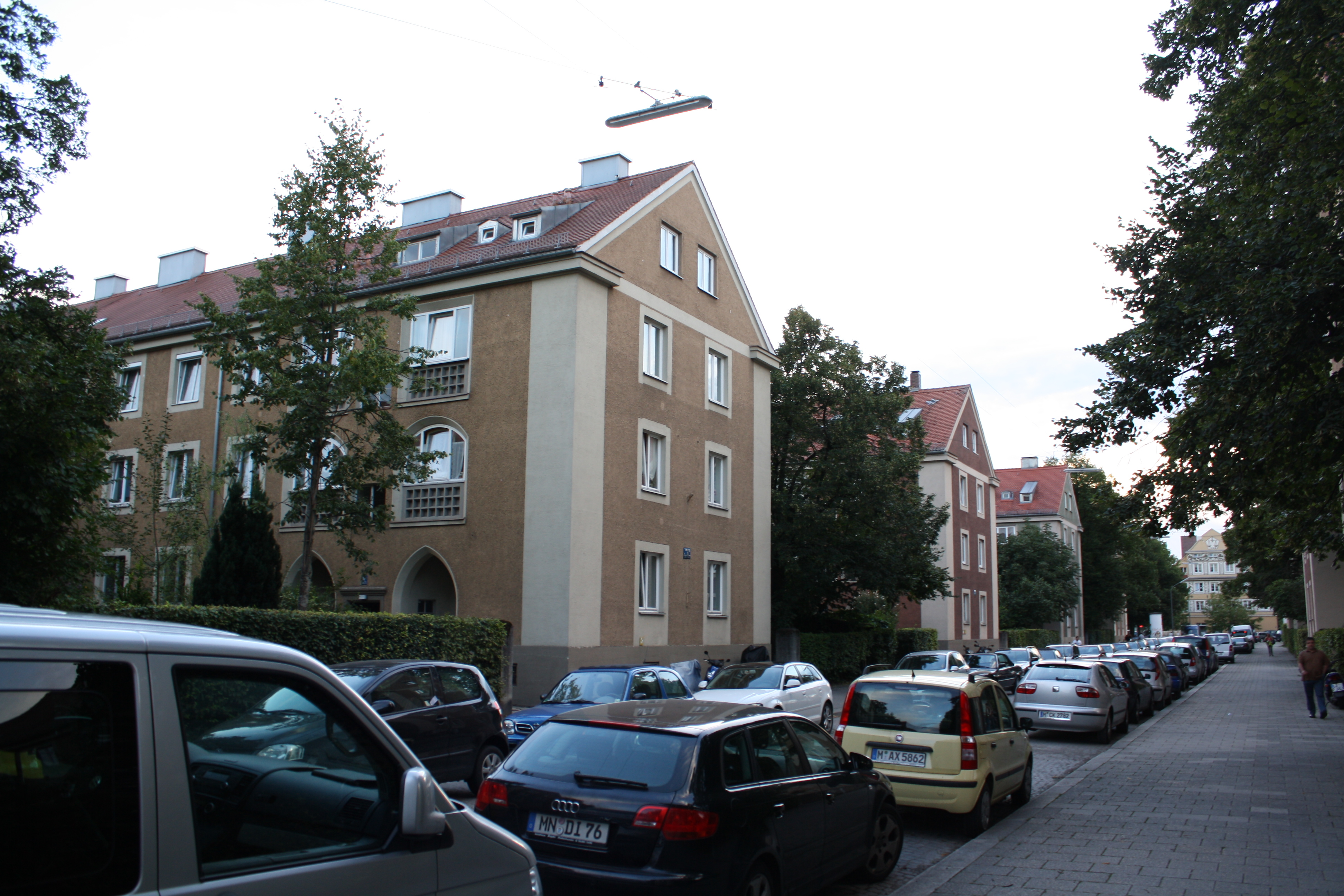 Alte Heide, München